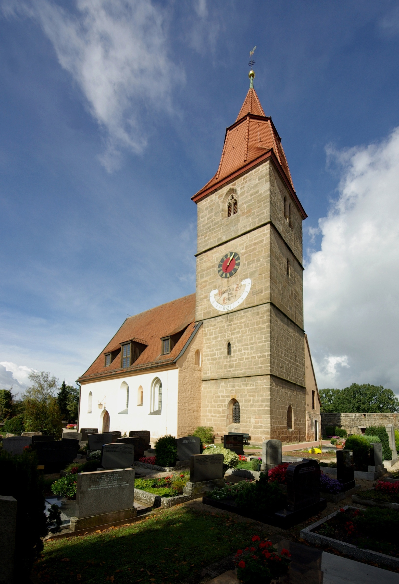 Kirche St. Veit in Veitsbronn